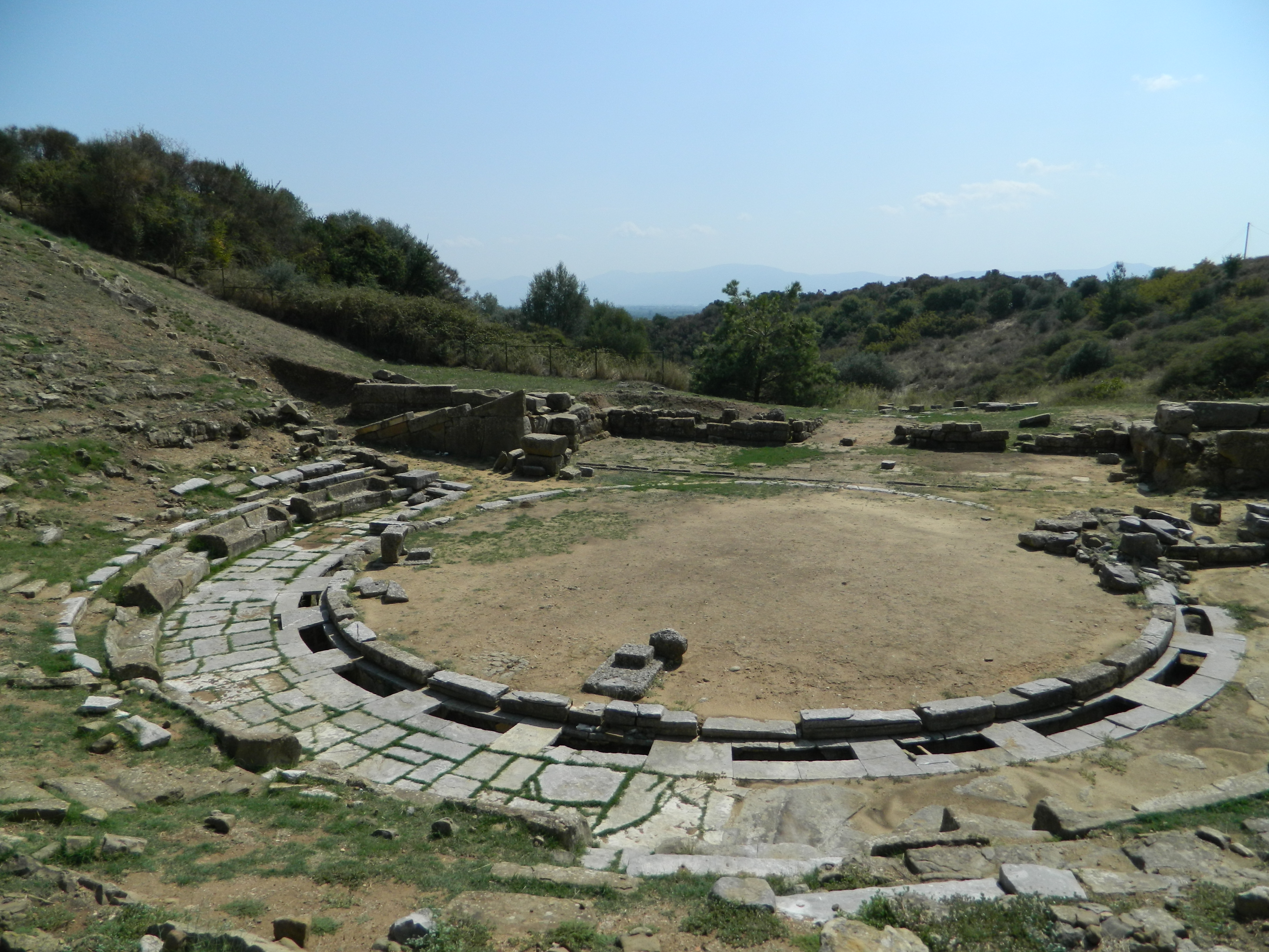 «Στράτος»